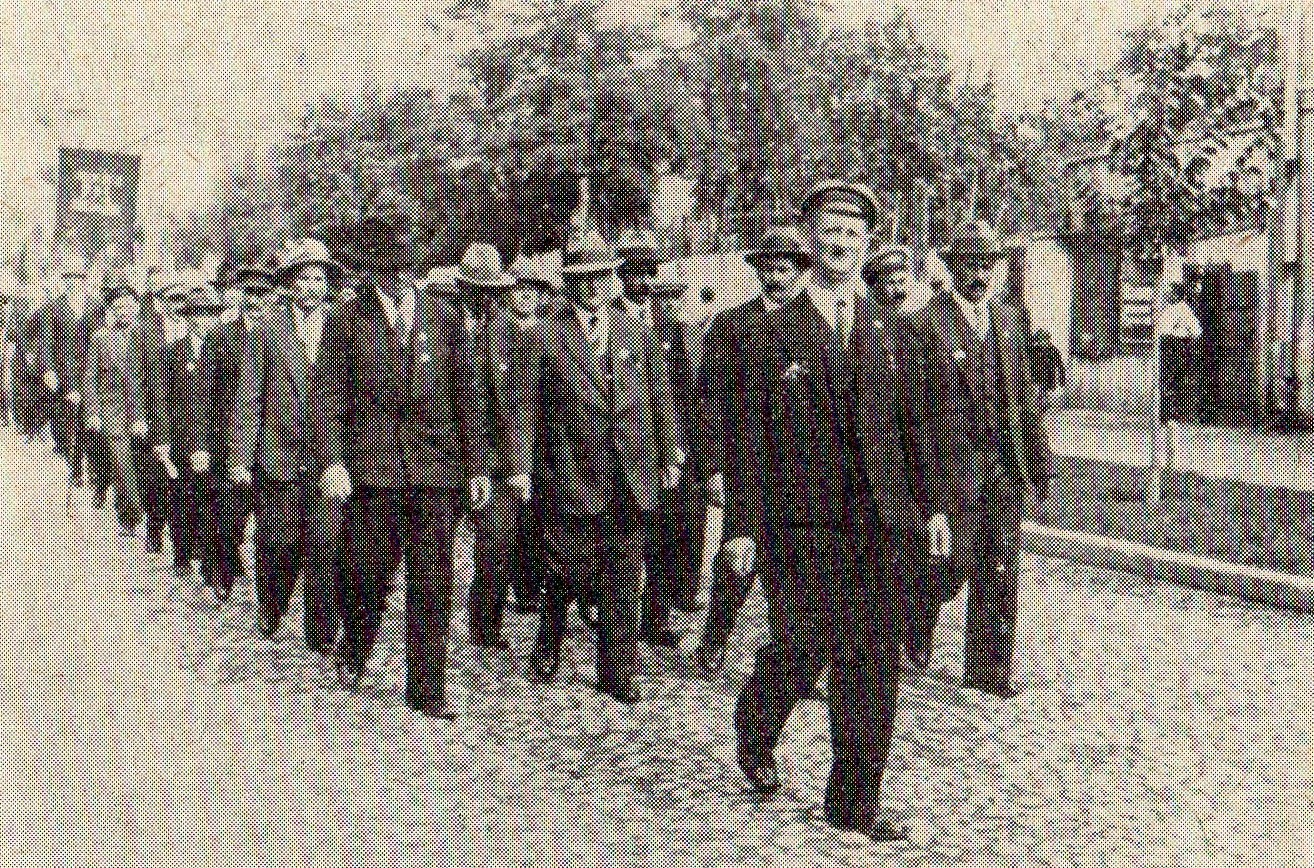 Oddział organizacji bojowej PPS okręgu radomsko-kieleckiego podczas obchodów 30. rocznicy krwawej środy w dniu 6 września 1936r.